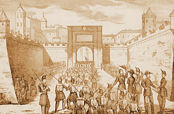 Ingresso dei Francesi in Roma nel 1849, litografia, ritoccato, ridotto